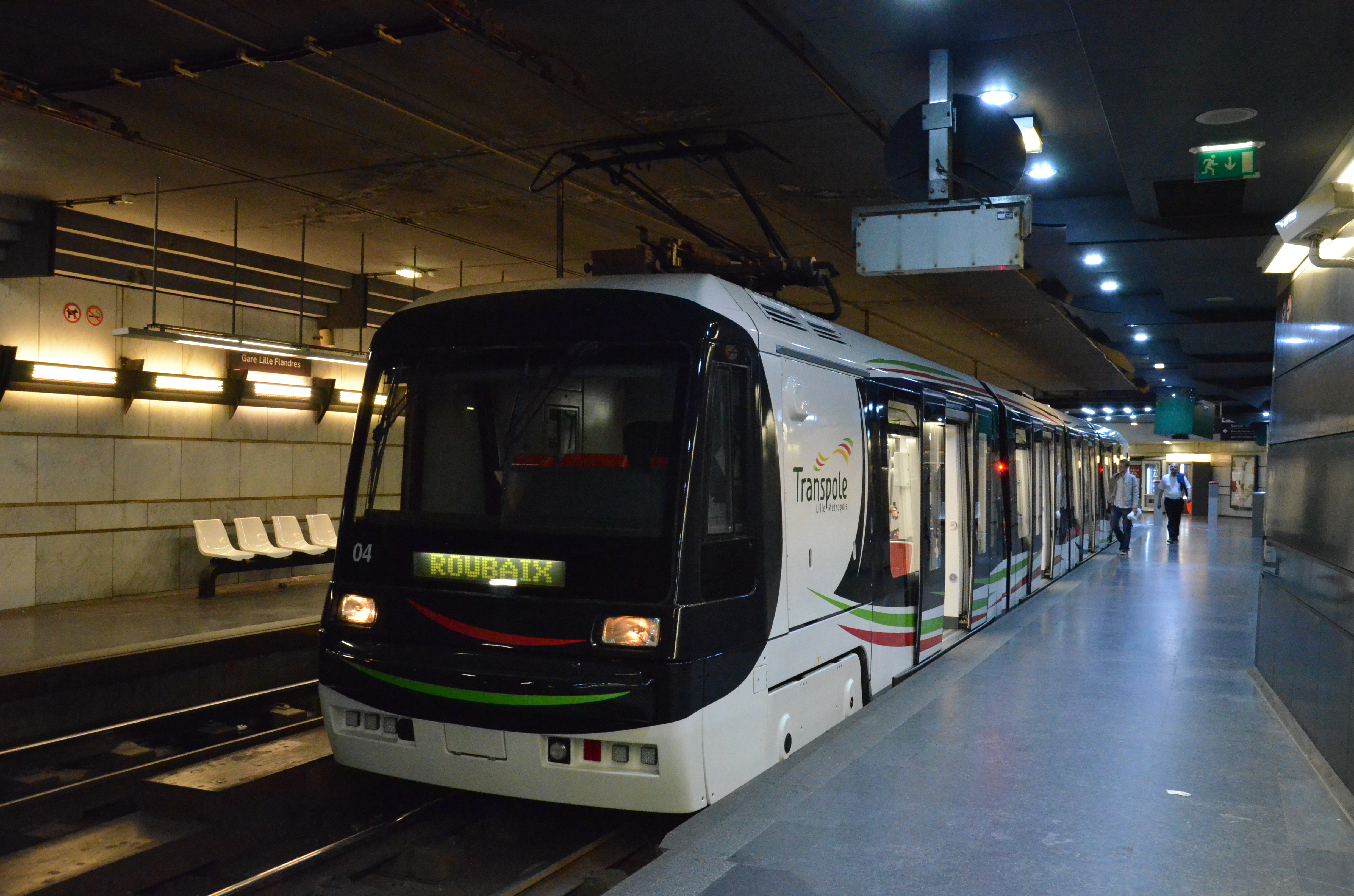 Breda n°04 sur la ligne de tramway R Transpole, à la station terminus Gare Lille Flandres.